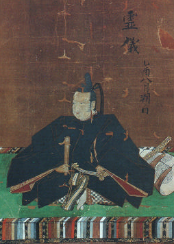 松平忠昌の肖像。